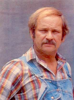 Hernando Casanova en su papel de Eutimio Pastrana Polanía, en el seriado Don Chinche.